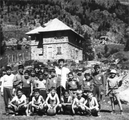 Colonie de vacances de l'association La Semeuse, à Saint-Grat dans la Vallée de la Gordolasque (Alpes-Maritimes, France). Photo prise en 1965 lors d'une rencontre de football.